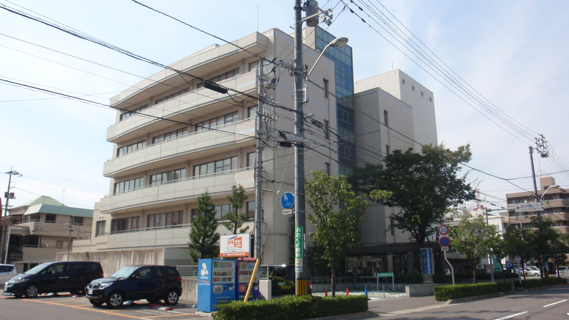 香川県高松市にある高松市保健所の施設「保健センター」。